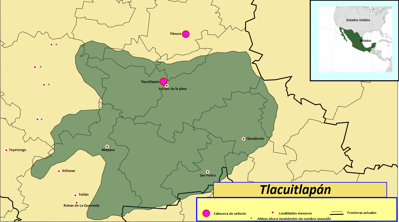 Mapa del antiguo estado precolombino de Tlacuitlapán, que se ubicaba en la parte central de lo que ahora es Zacatecas.